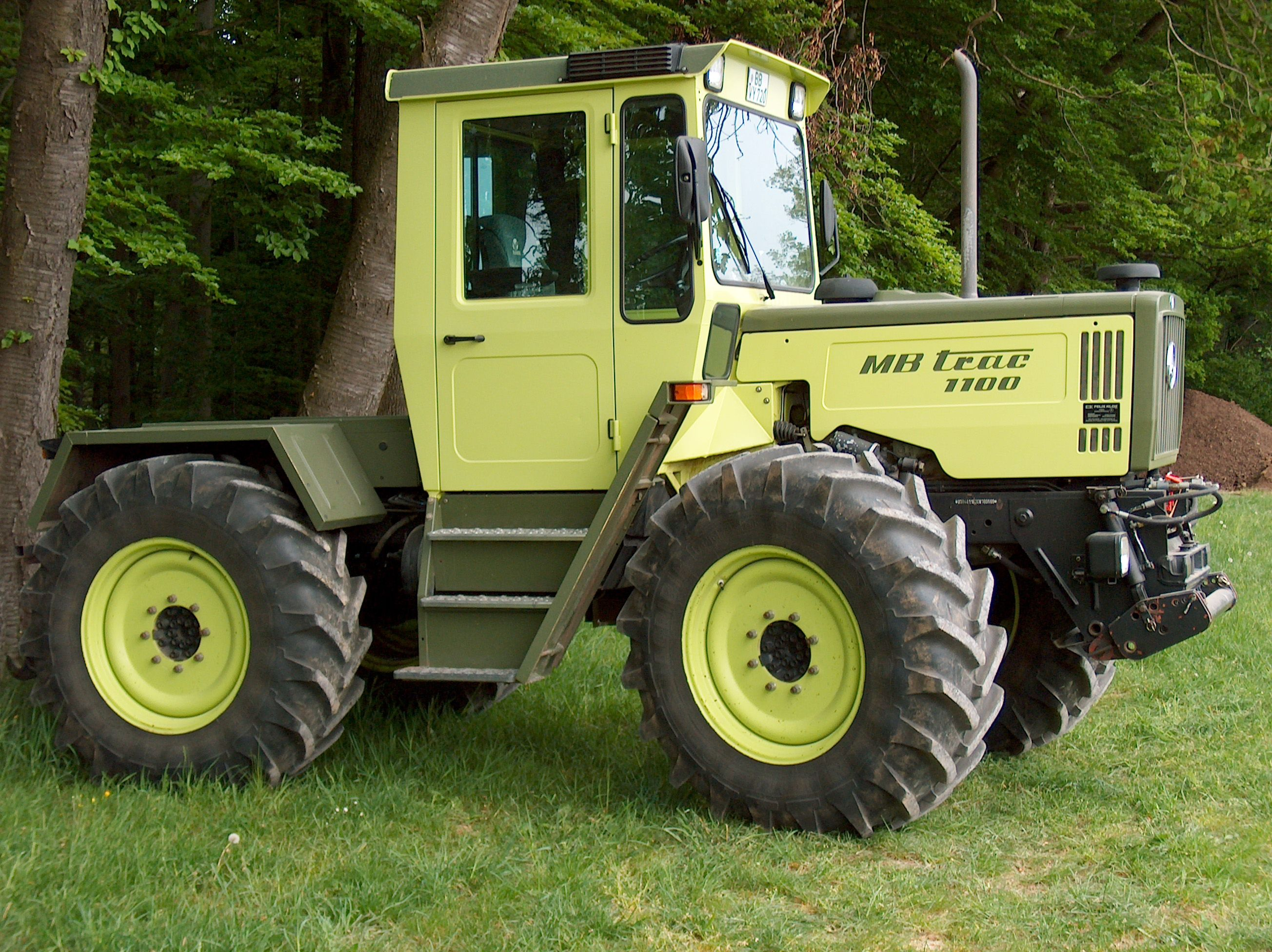 MB Trac1100